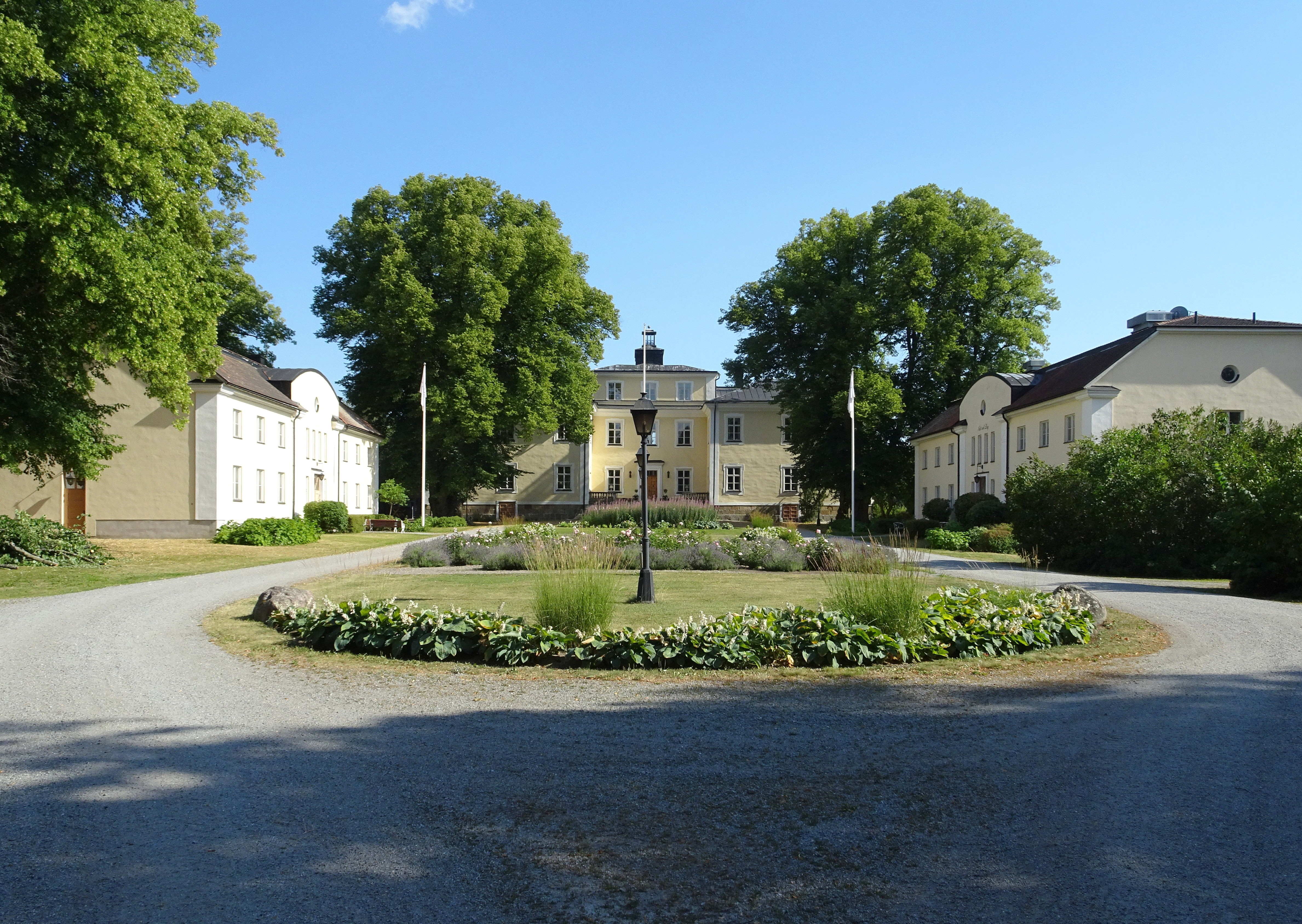 Haga slott, Enköping, huvudbyggnad och inre flyglar